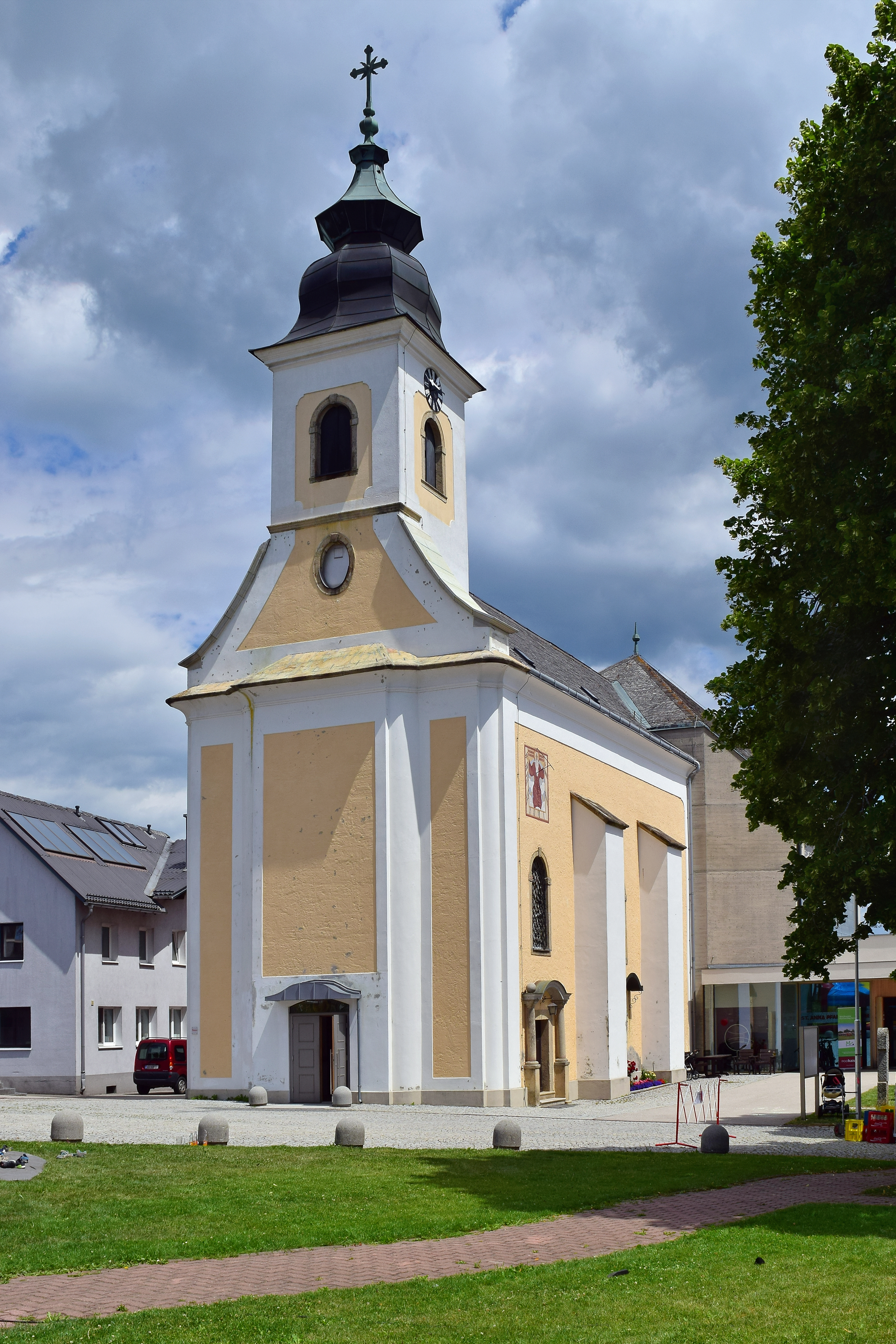 Kath. Pfarrkirche hl. Anna in Kirchschlag bei Linz